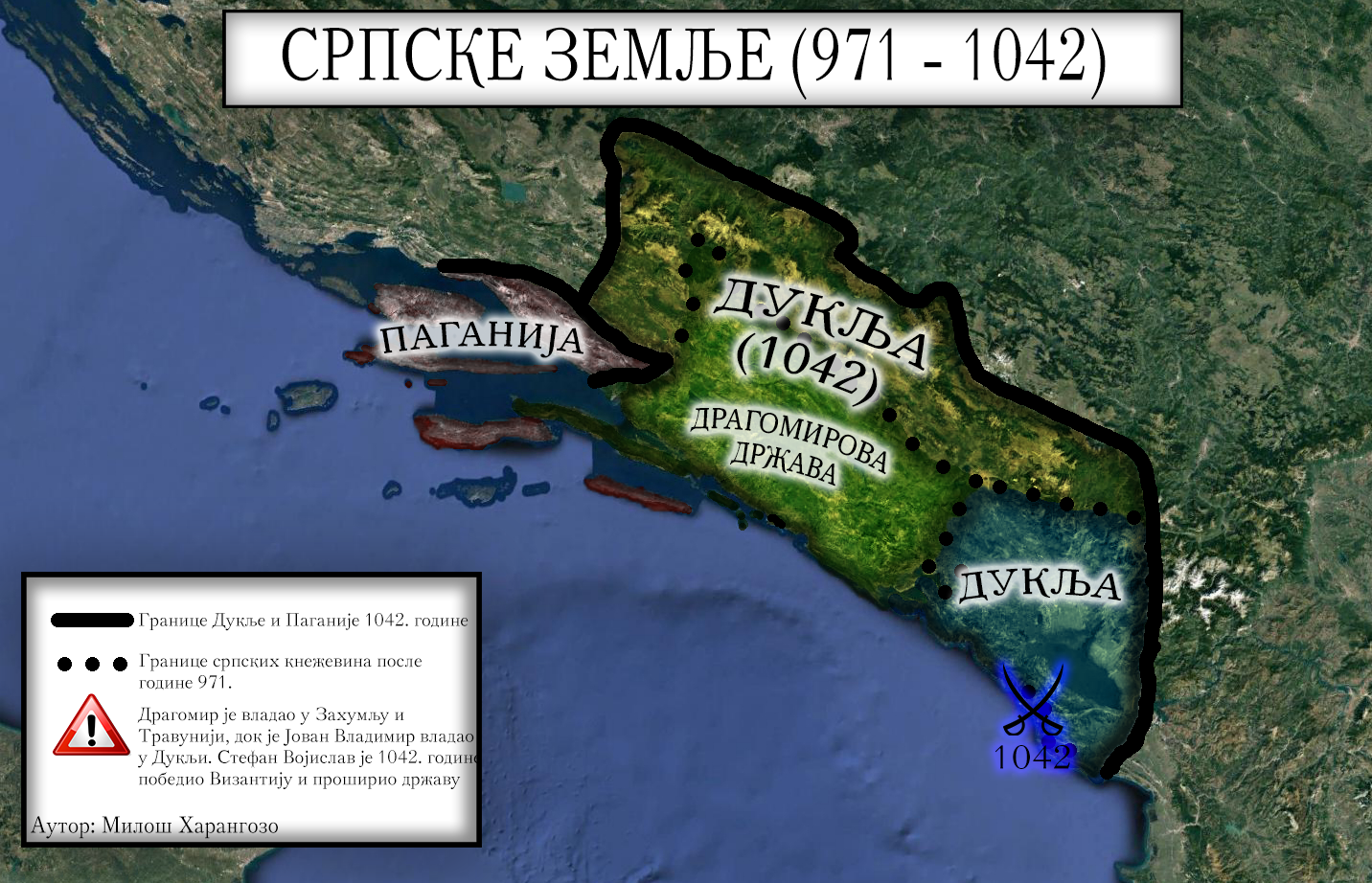 Српске земље у 10. и 11. веку.